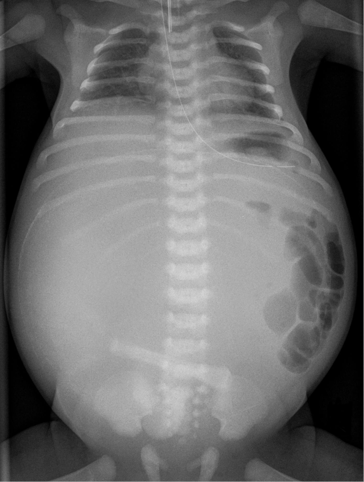 Röntgenbild eines Neugeborenen mit großer, raumfordernder Mekoniumzyste (besser - pseudozyste), die Magen und Darmstrukturen nach außen verdrängt. Man erkennt gut die zarte, randständige Verkalkung. Ursächlich war in diesem Fall ein Atresie des terminalen Ileums. Die schräg verlaufende Verschattung unten in der Mitte ist die Nabelklemme.